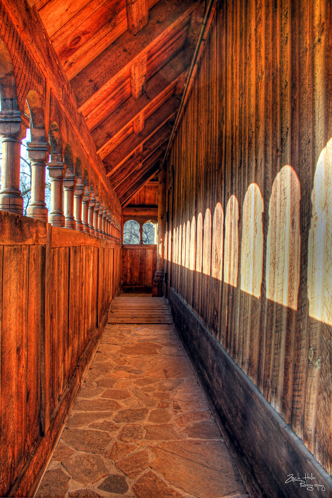 Hopperstad stave church replica på Heritage hjemkomst center i Moorhead, Minnesota, USA